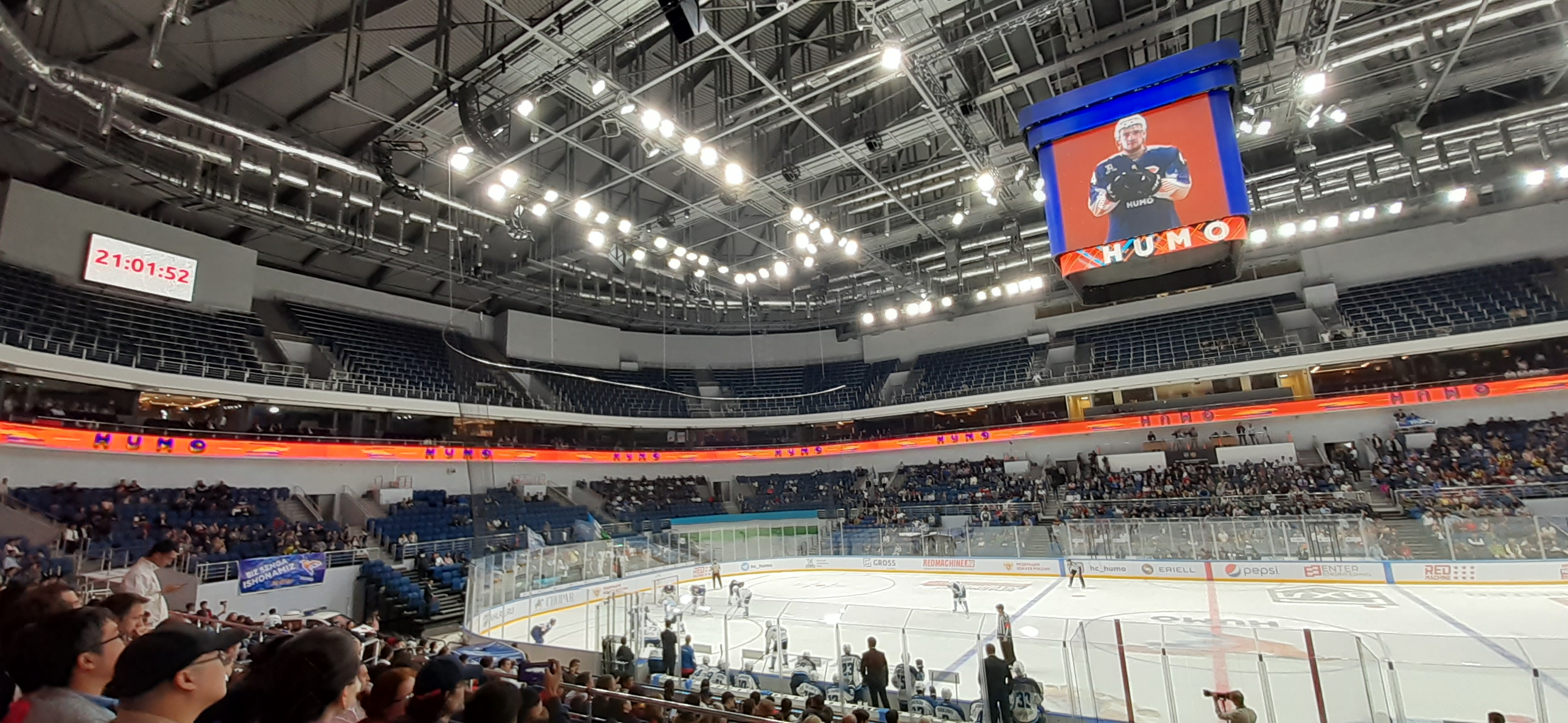 Первый матч команды «Хумо» в ВХЛ, 11 сентября 2019 года.